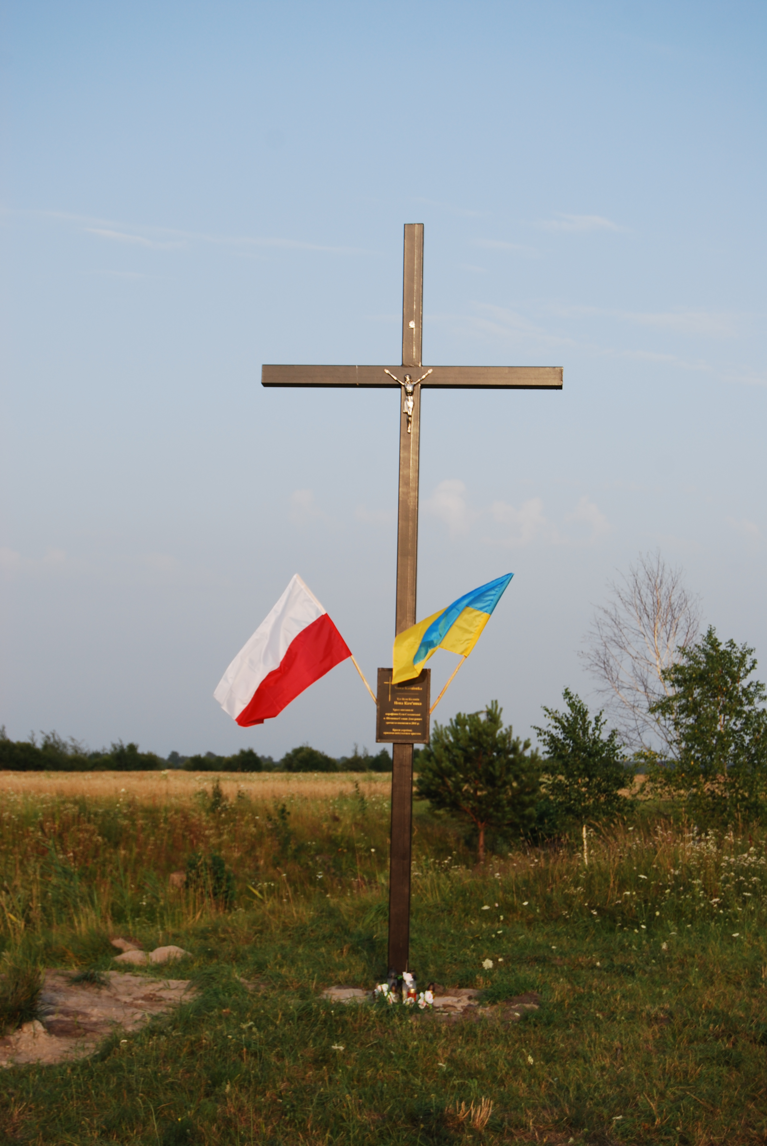 Nowa Kamionka. Krzyż i tabliczka upamiętniające nieistniejącą polską kolonię.